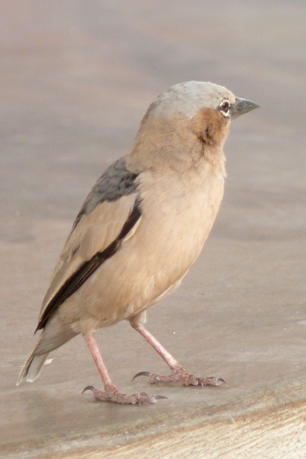 Marmorspätzling (Pseudonigrita arnaudi) (Bonaparte, 1850)